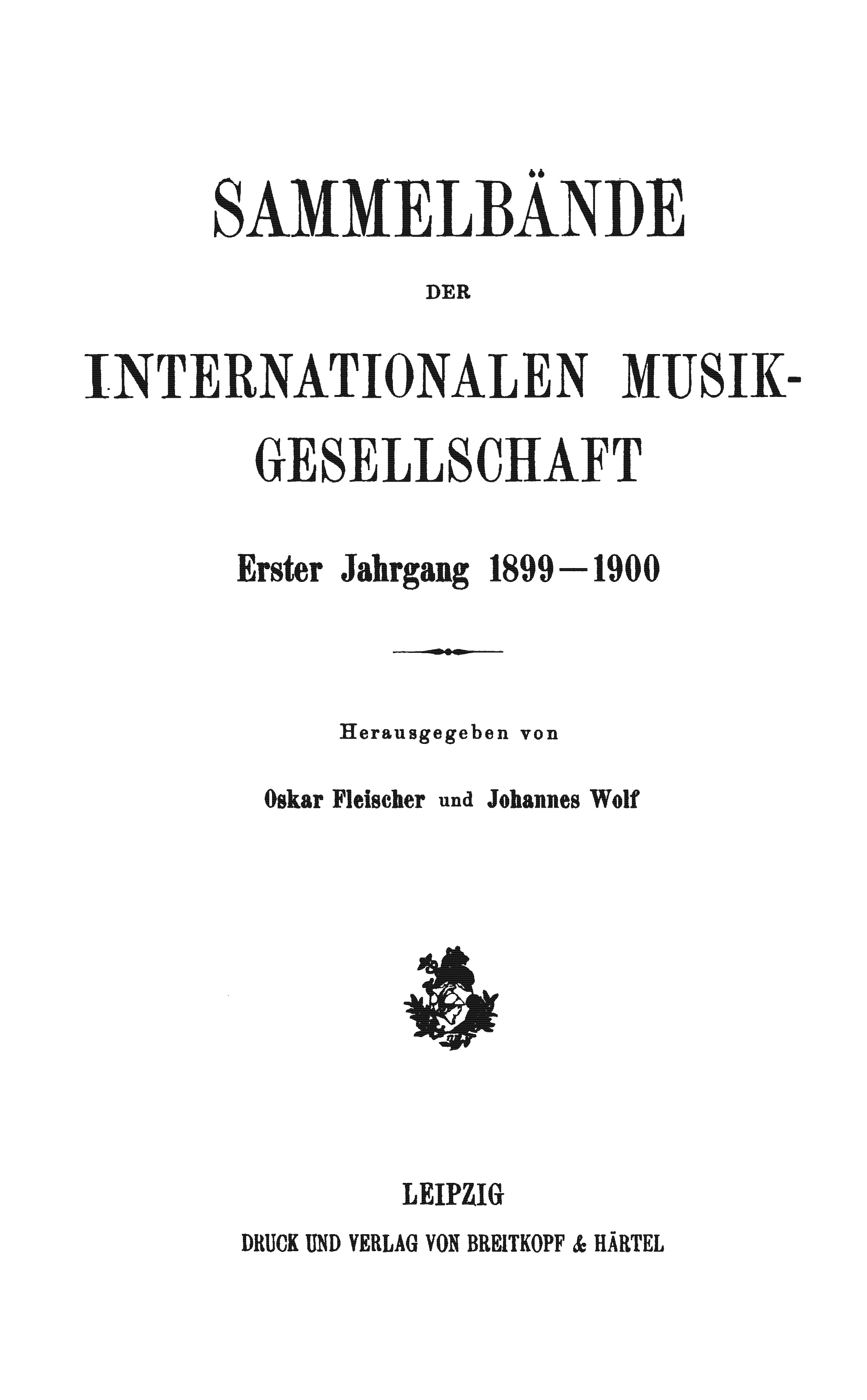 Titelseite der Zeitschrift / Title page of the periodical.